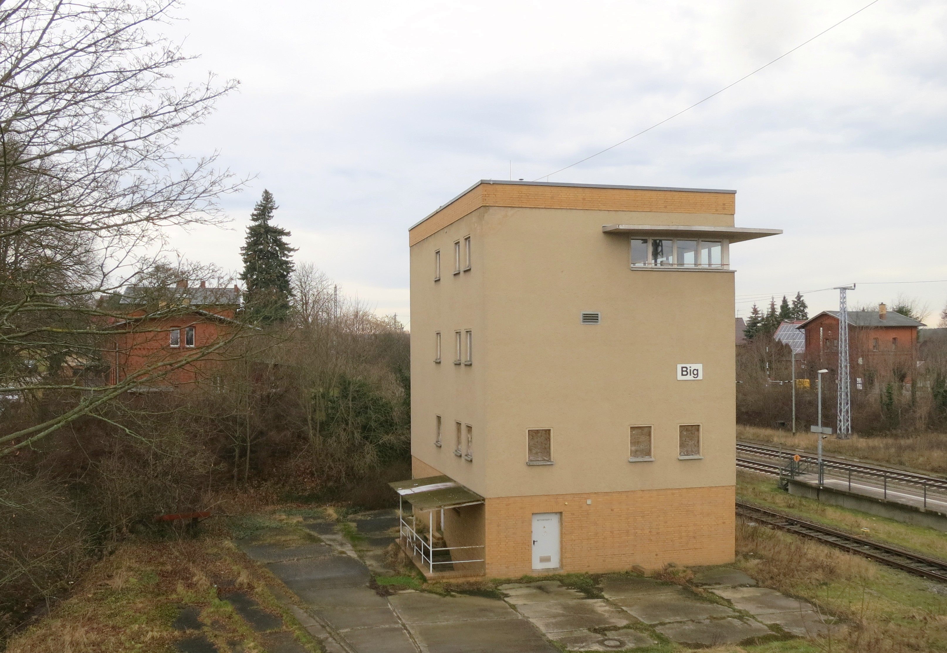 Bahnhof Bad Belzig, Stellwerk Big